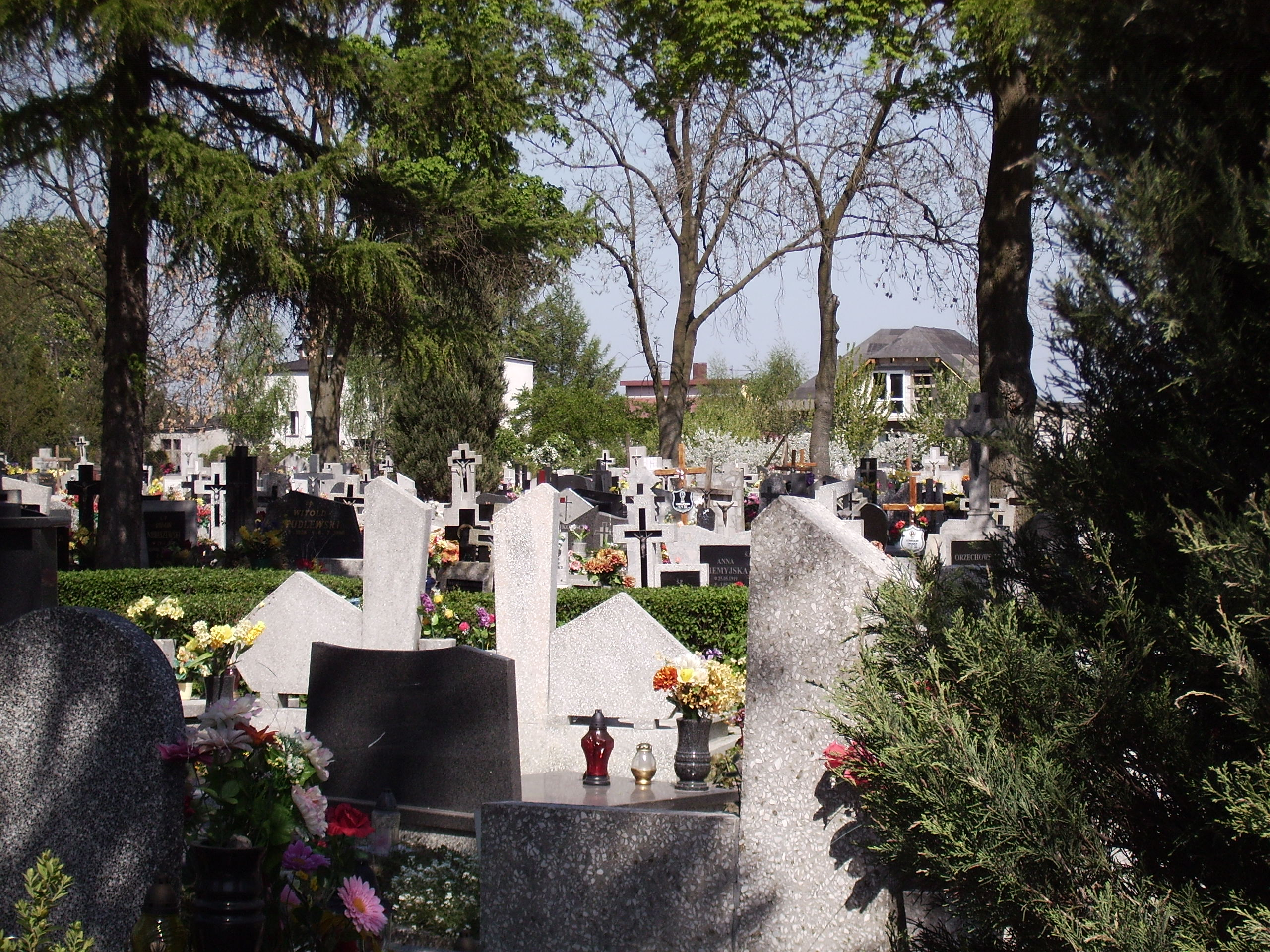 Cmentarz w Papowie Biskupim.